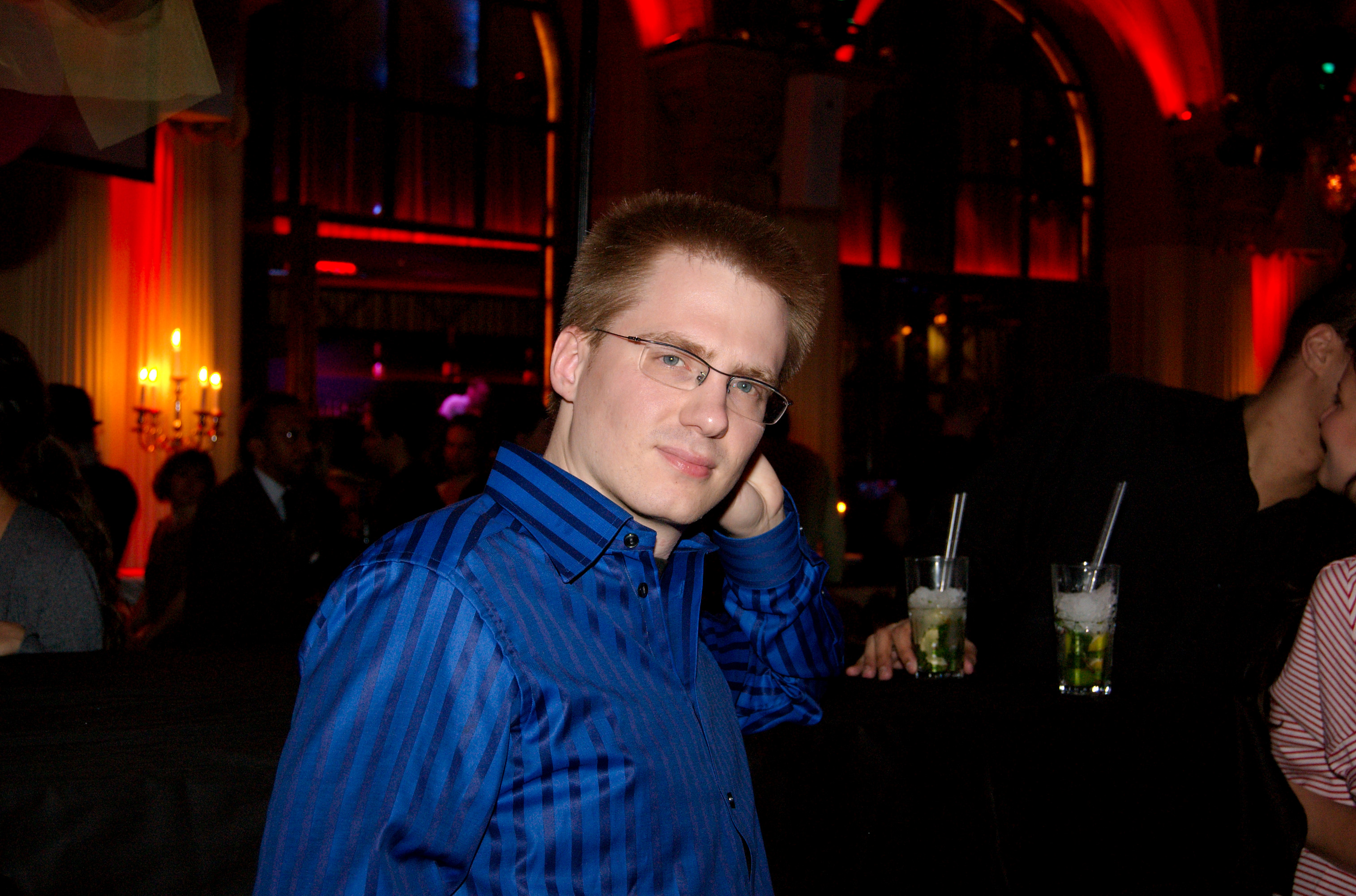 Tore Kullgren, på Cafe Opera